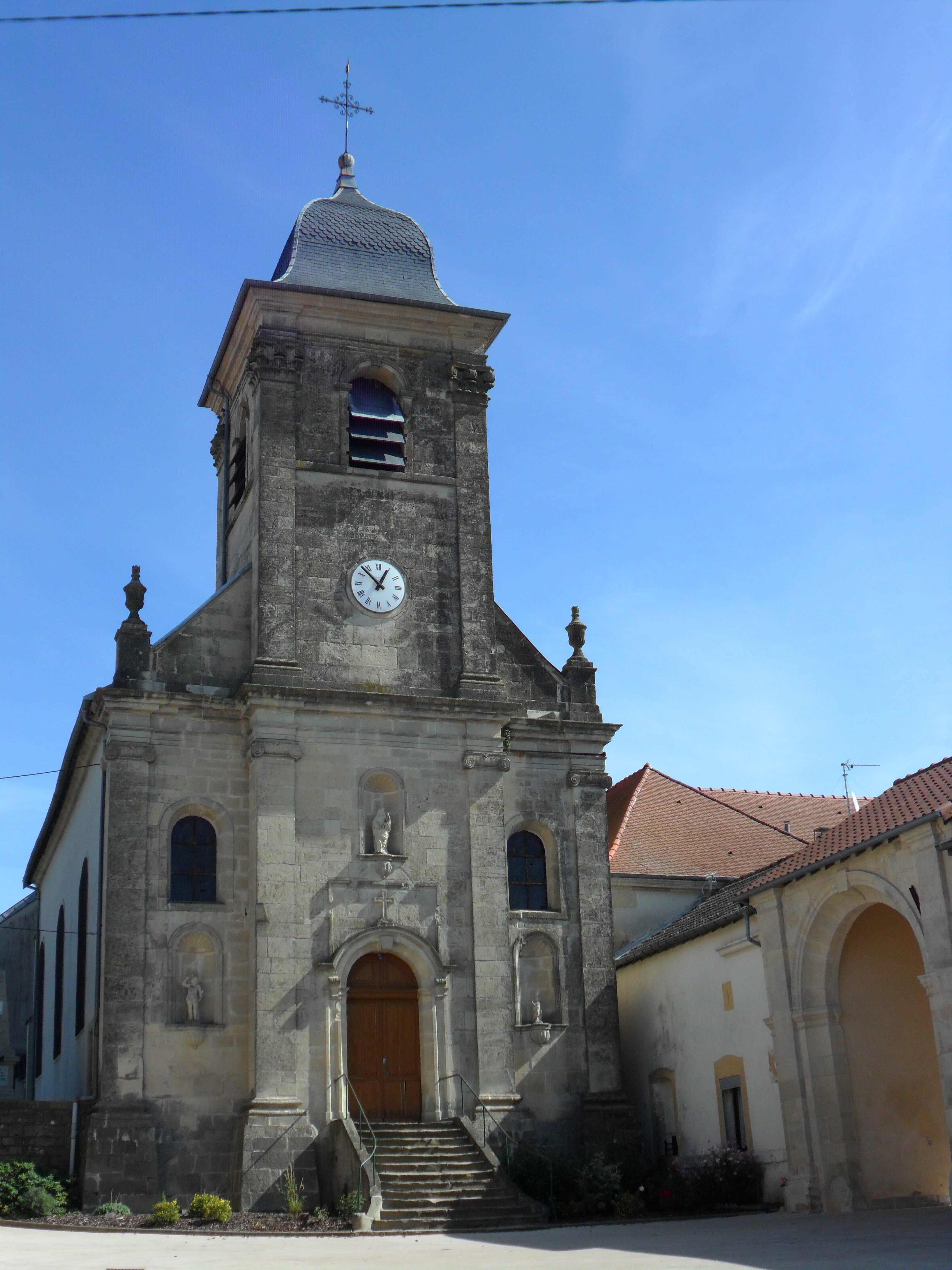 Ancien prieuré de Parey-sous-Montfort.Église .